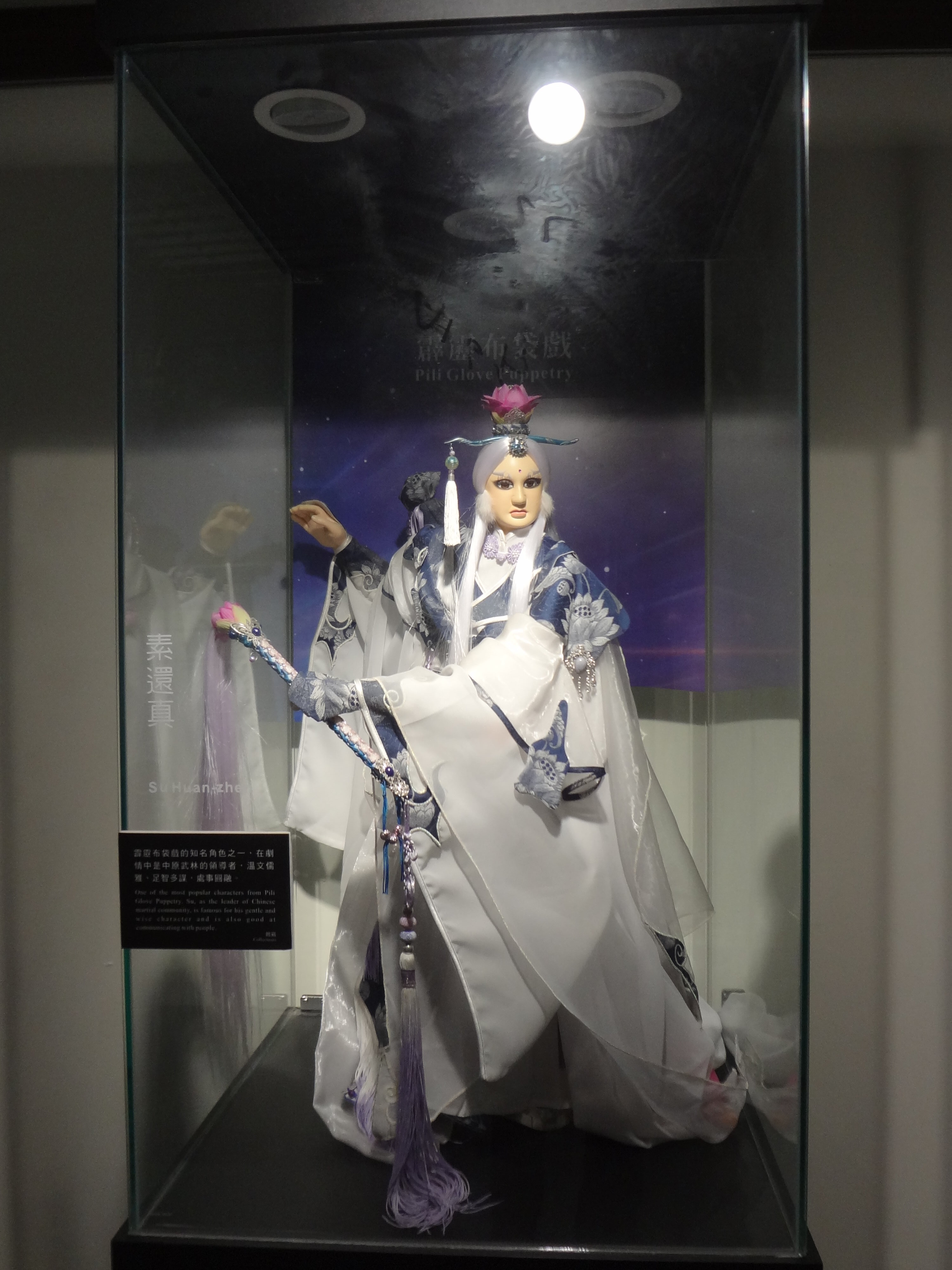 臺北市藝文推廣處大稻埕戲苑，霹靂布袋戲素還真戲偶。